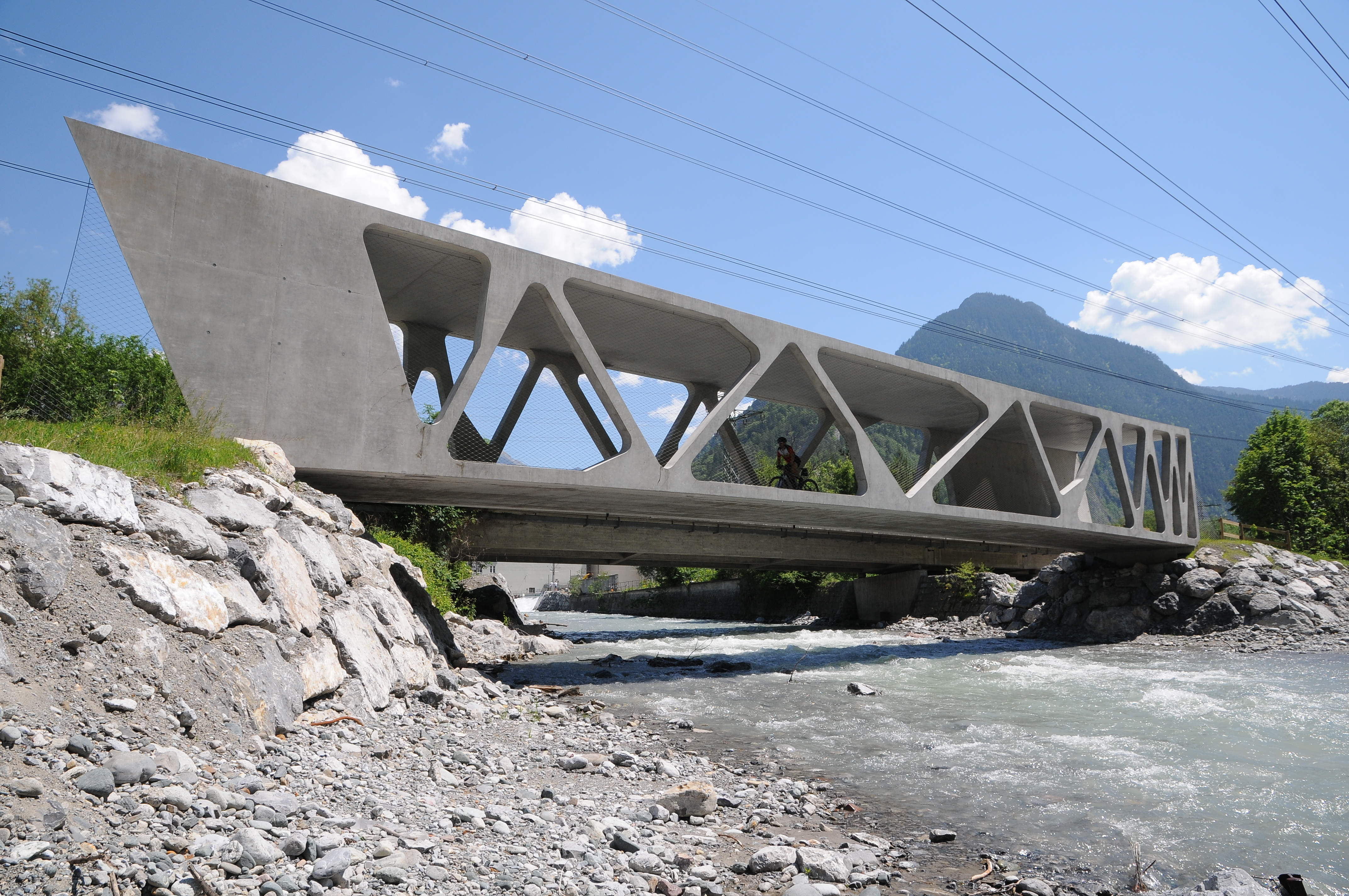 Fahrradbrücke über die Alfenz in Lorüns. 2010 erbaut nach Plänen vom Architekturbüro [1].